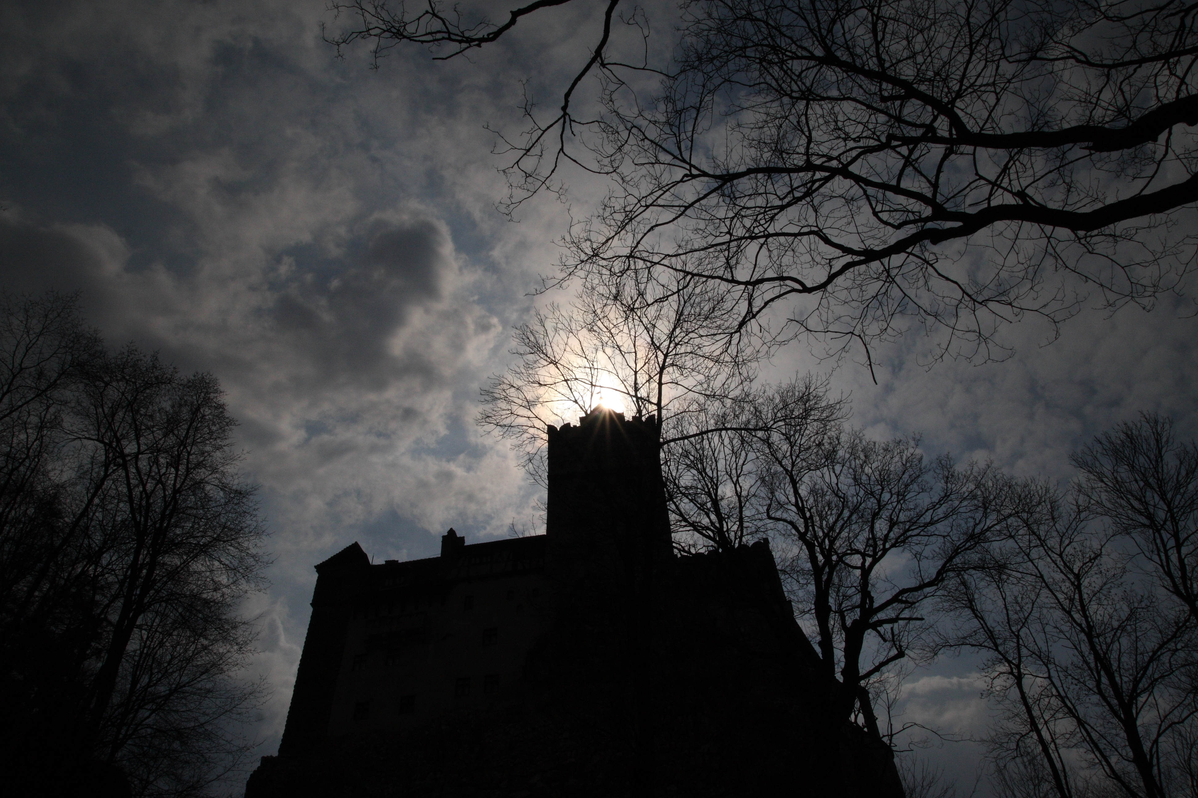 Bran Castle, Romania